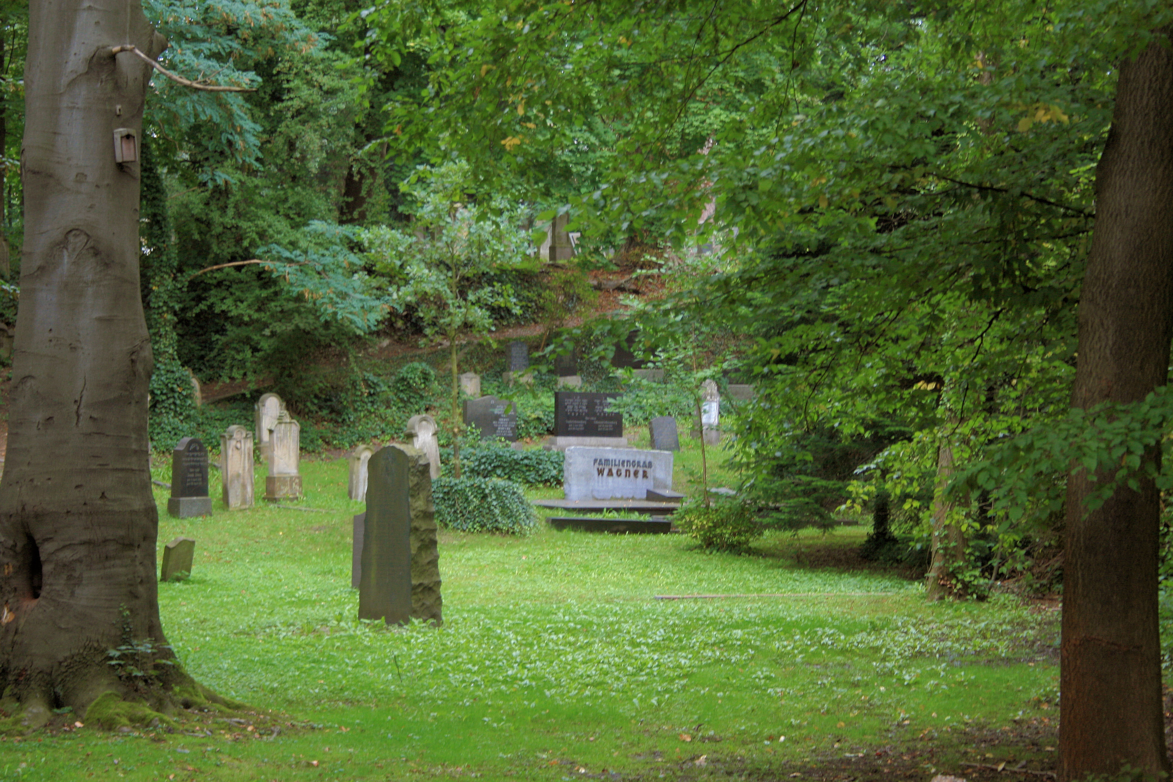 Jüdischer Friedhof Siegburg, Heinrichstr.